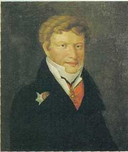 Портрет Панчулидзева А.Д.